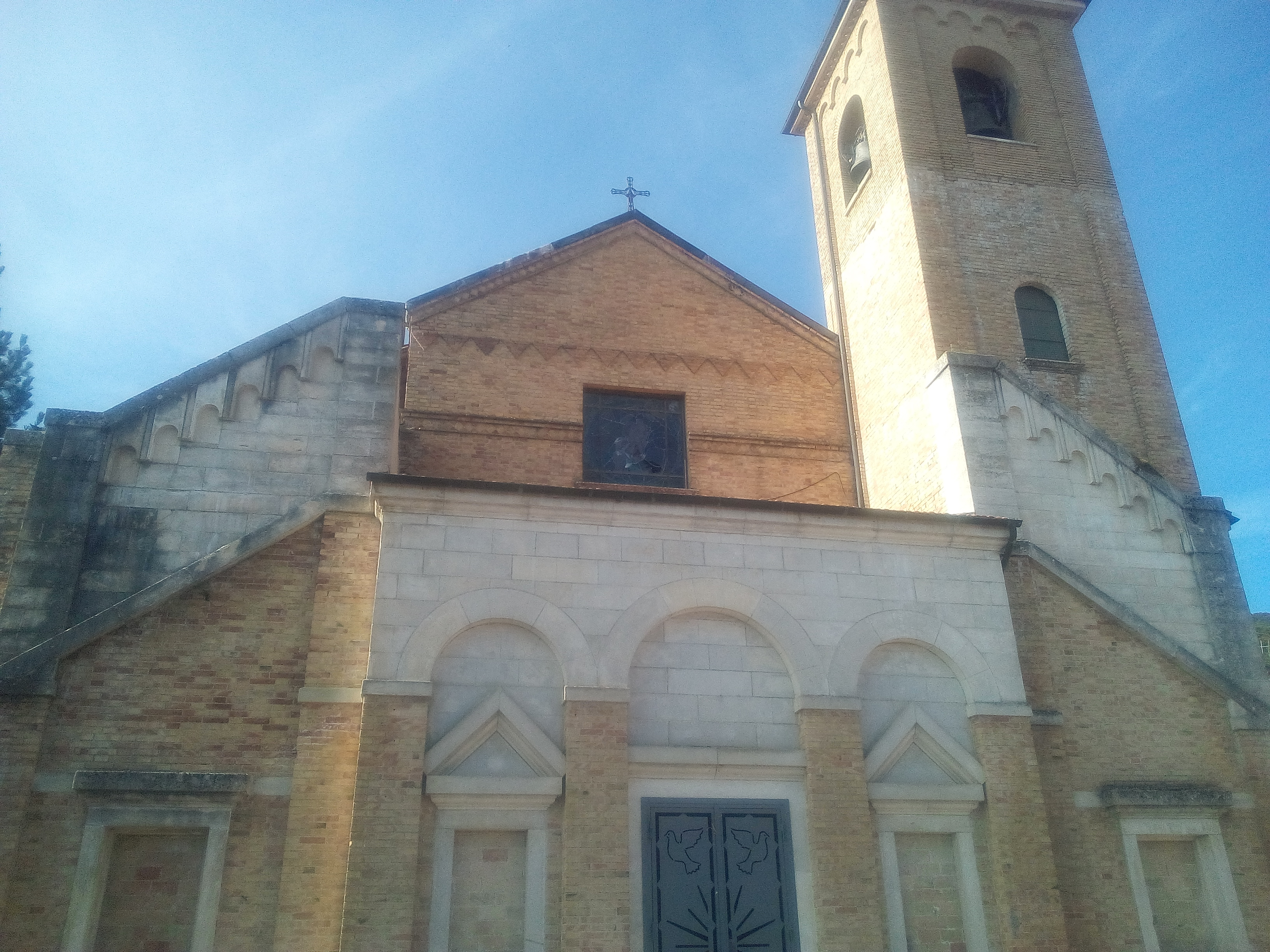 Chiesa di Santa Margherita a Cappadocia in Abruzzo